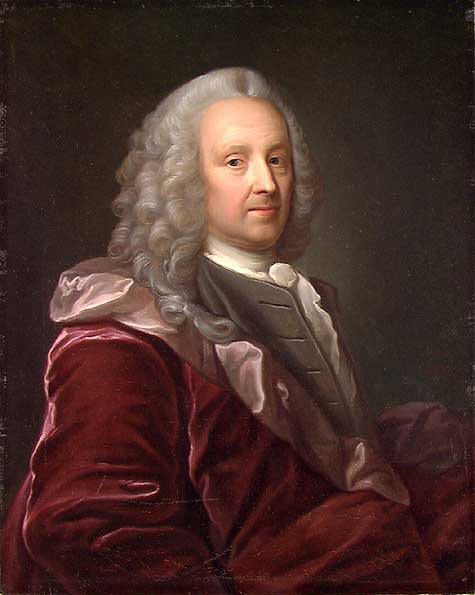 Ludvig Holberg, schilderij van Jørgen Roed (1808-1888) uit 1847. Kopie van een schilderij van Johan Roselius (1725-1803) uit 1752.